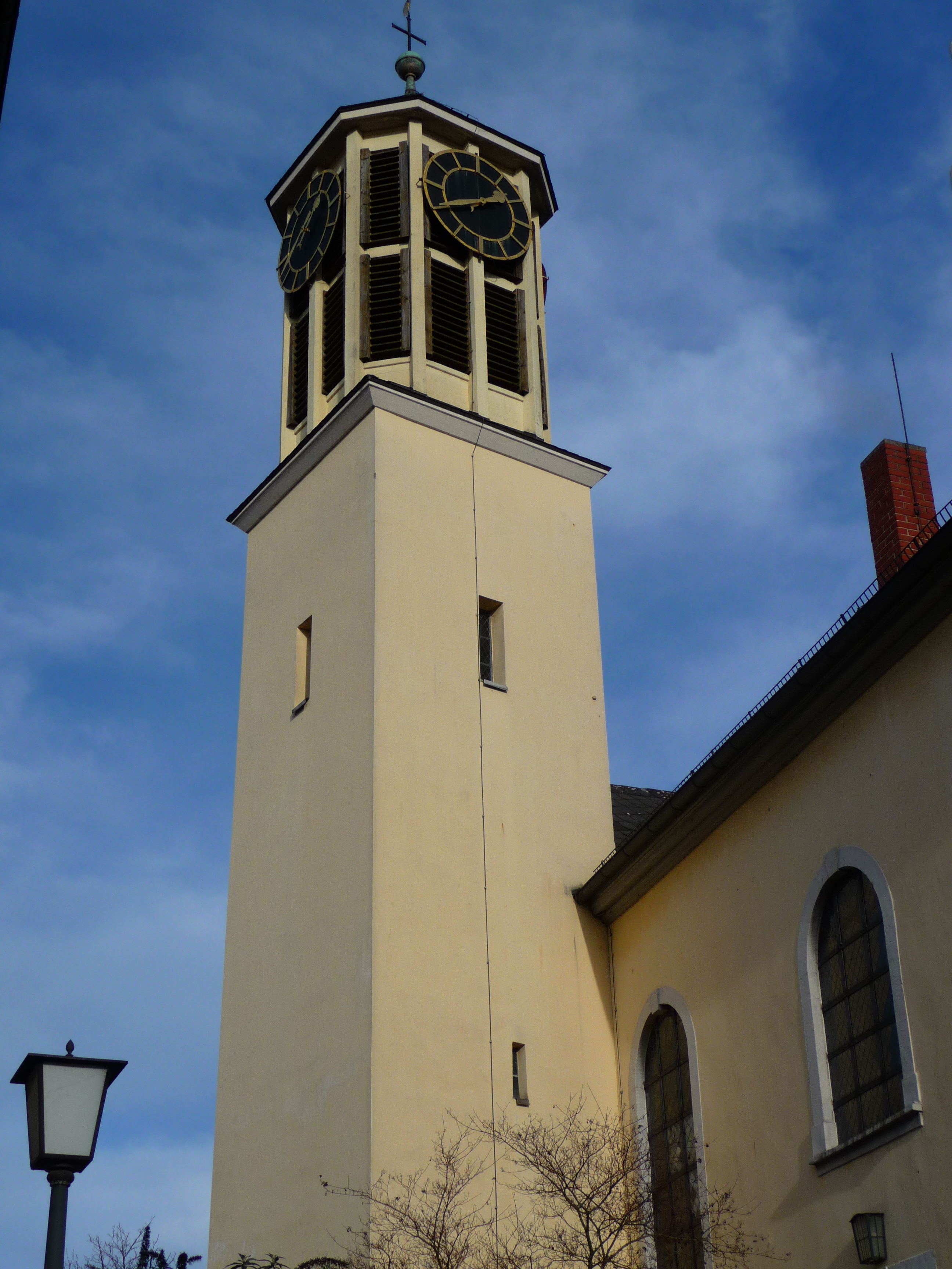 Eppelheim - Kirchturm der evangelischen Pauluskirche (1948 wurde über den alten Turmuntergeschossen eine offene Glockenstube aus Stahlbeton aufgesetzt)